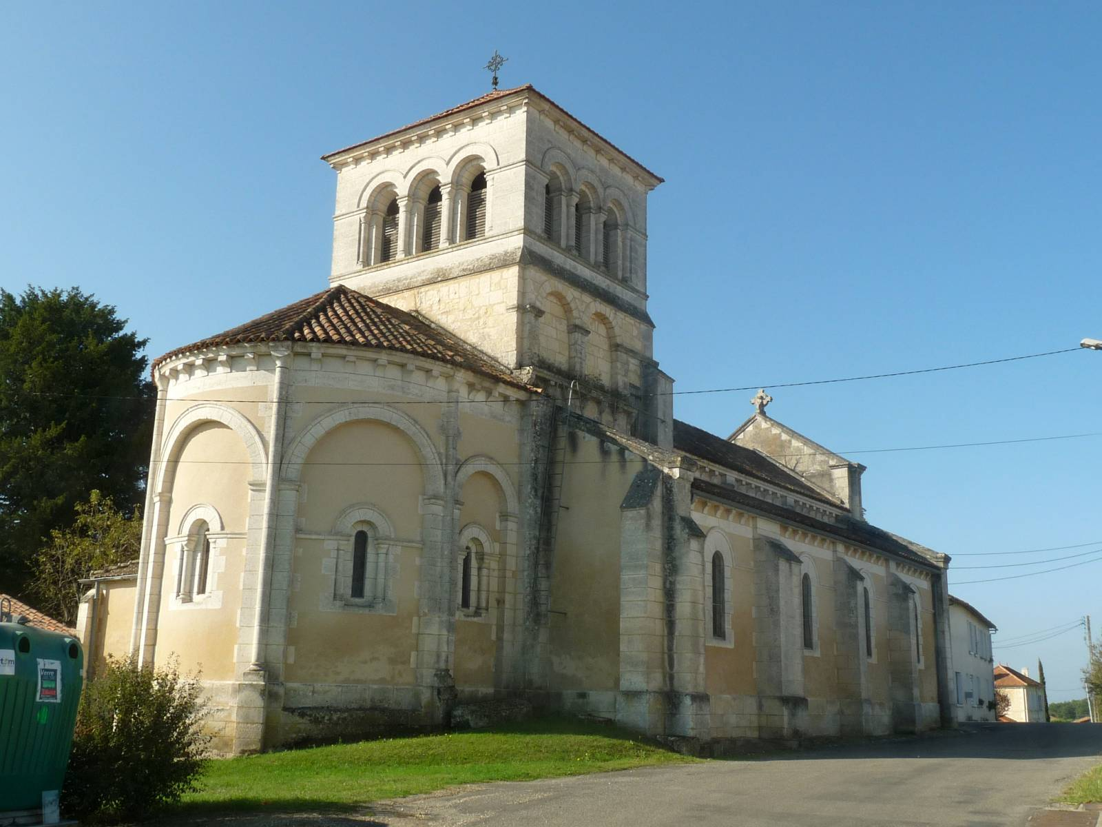 église de Bazac (16), France